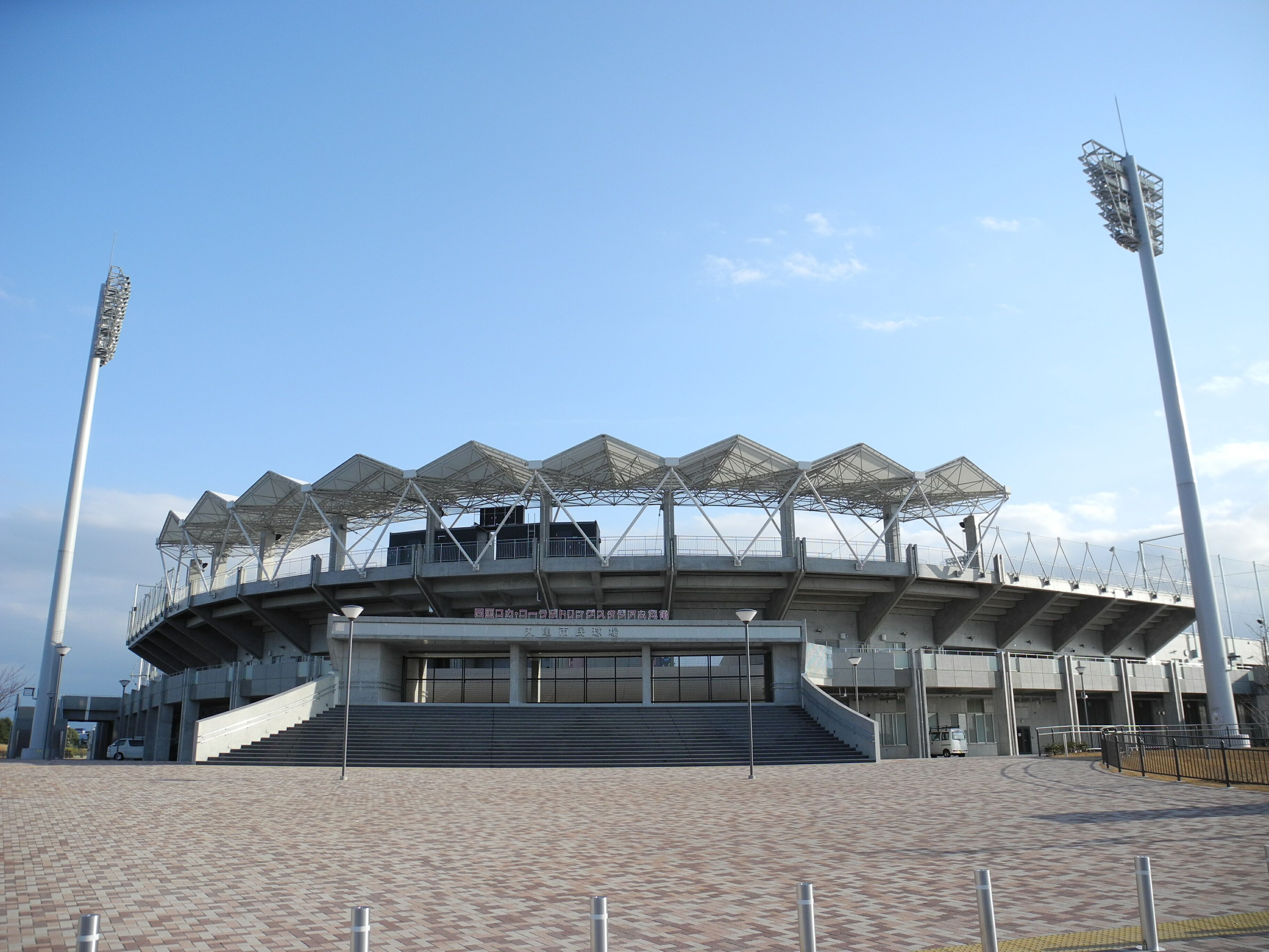 丸亀市民球場 - 日本国香川県丸亀市。